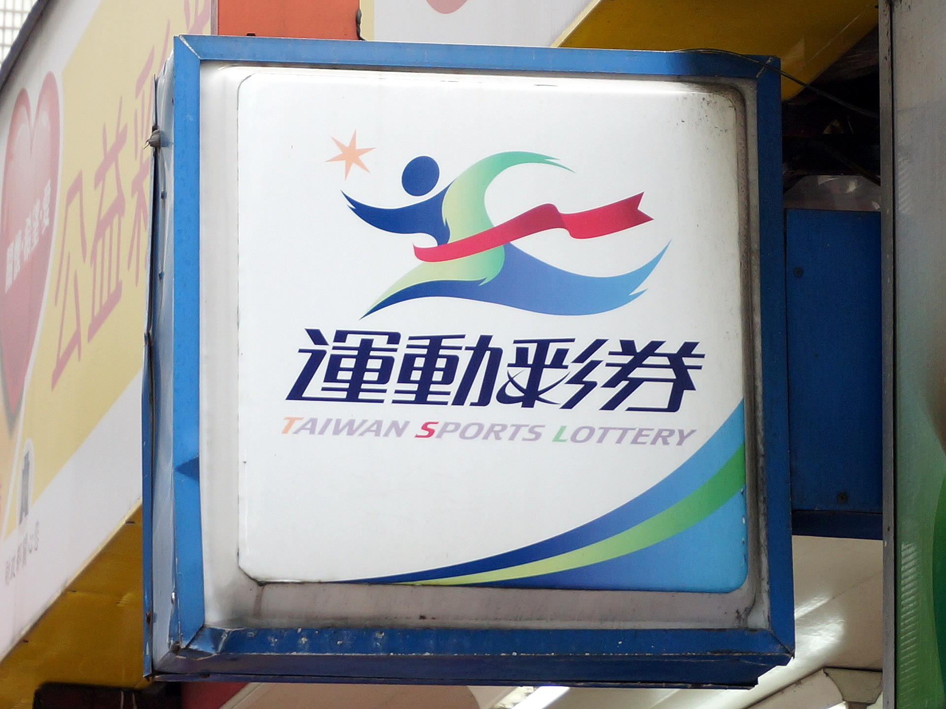 台北富邦銀行運動彩券投注站小燈箱。